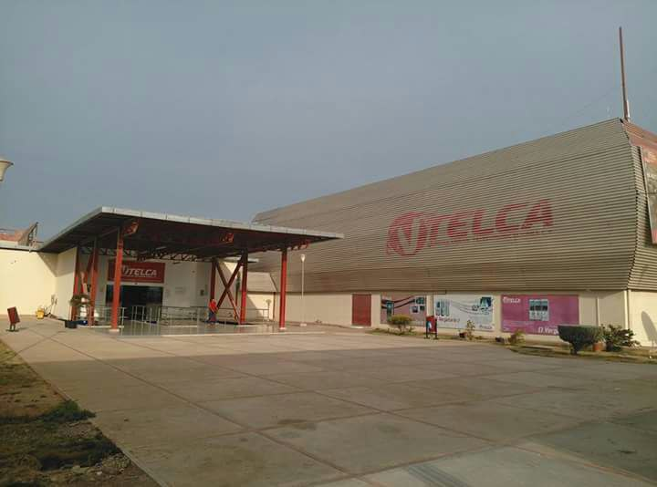 Vtelca, entrada principal.